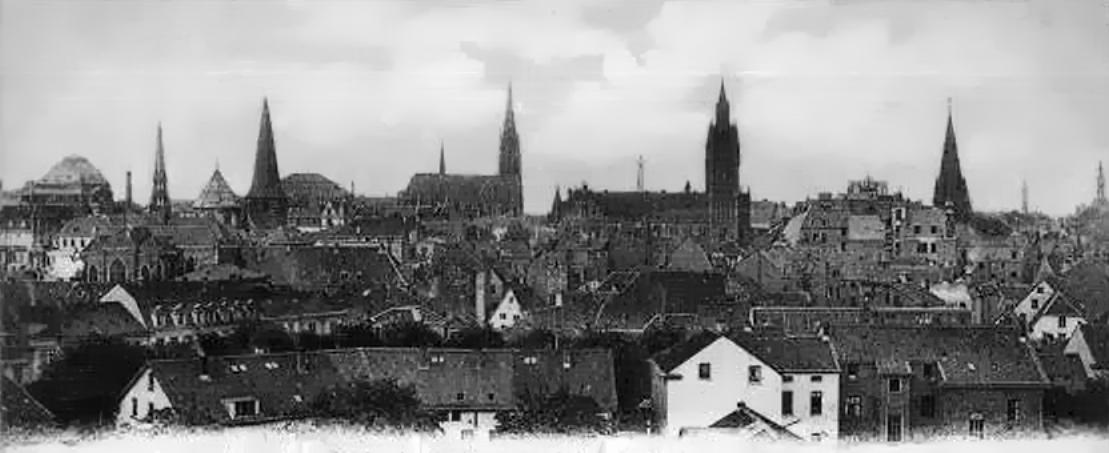 Ansicht der Stadt Essen 1898 aus Osten